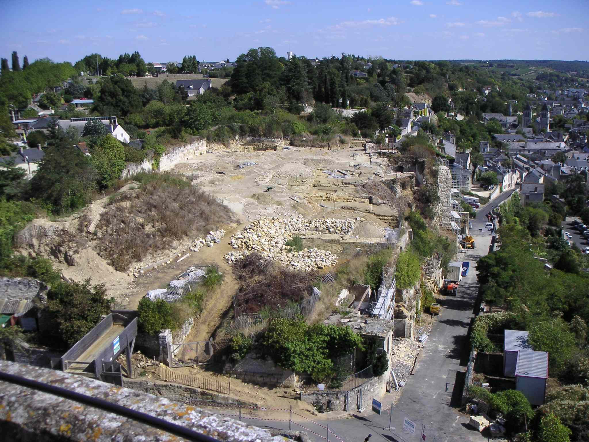 Vue du Fort Saint-Georges, première défense du château de Chinon